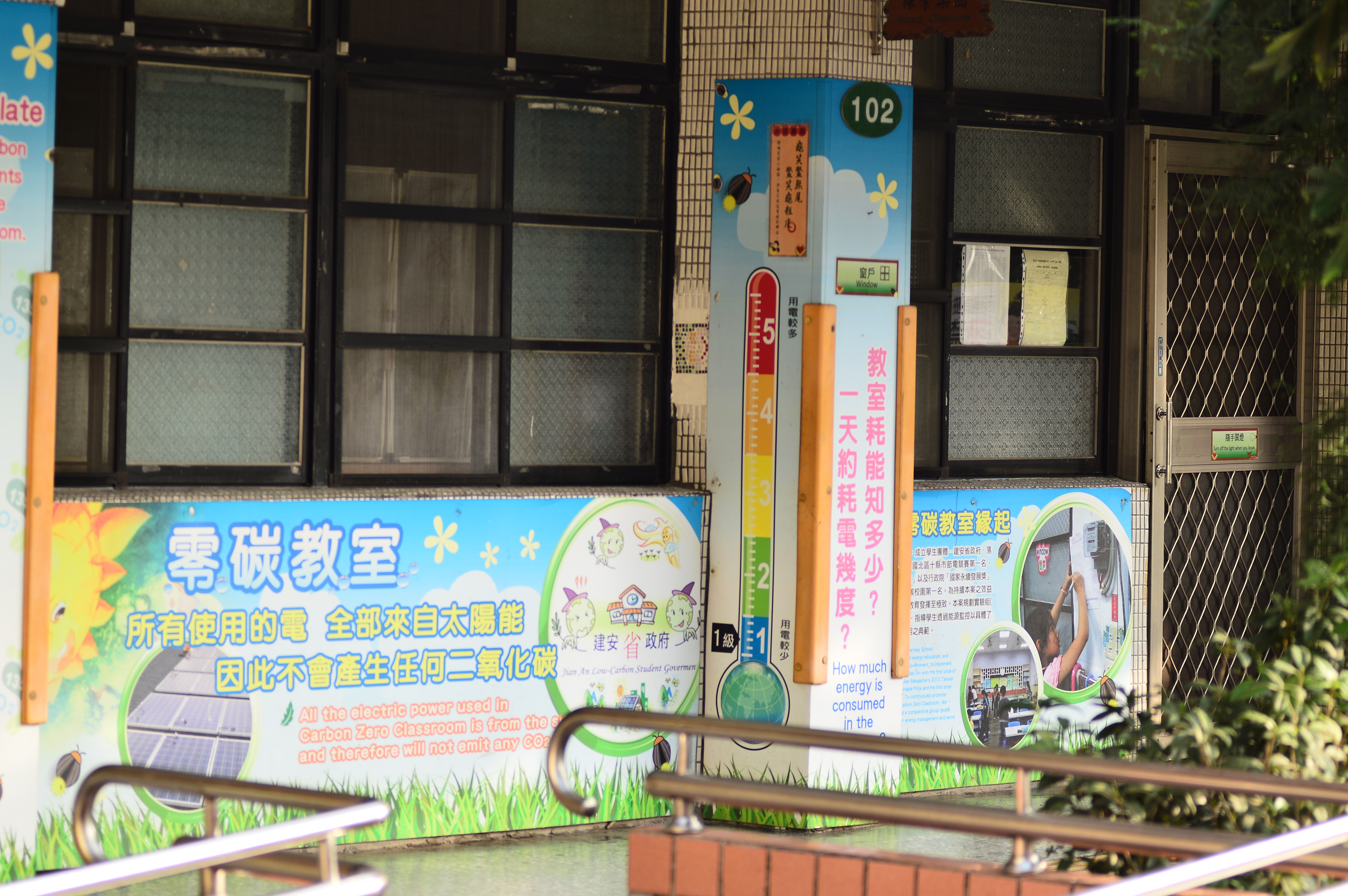 2016年新北市三峽區建安國小校園一景